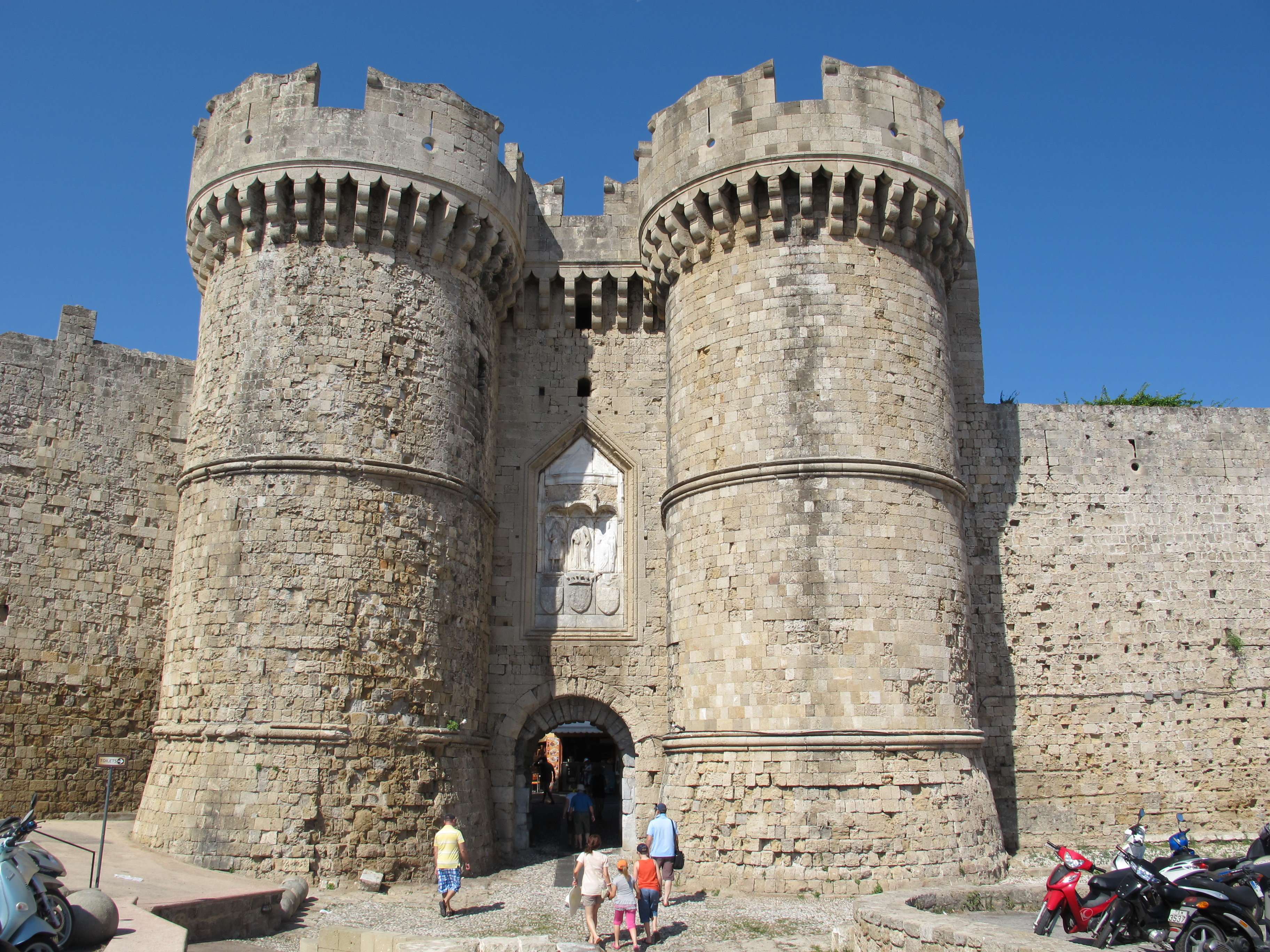 Rodi porta della marina